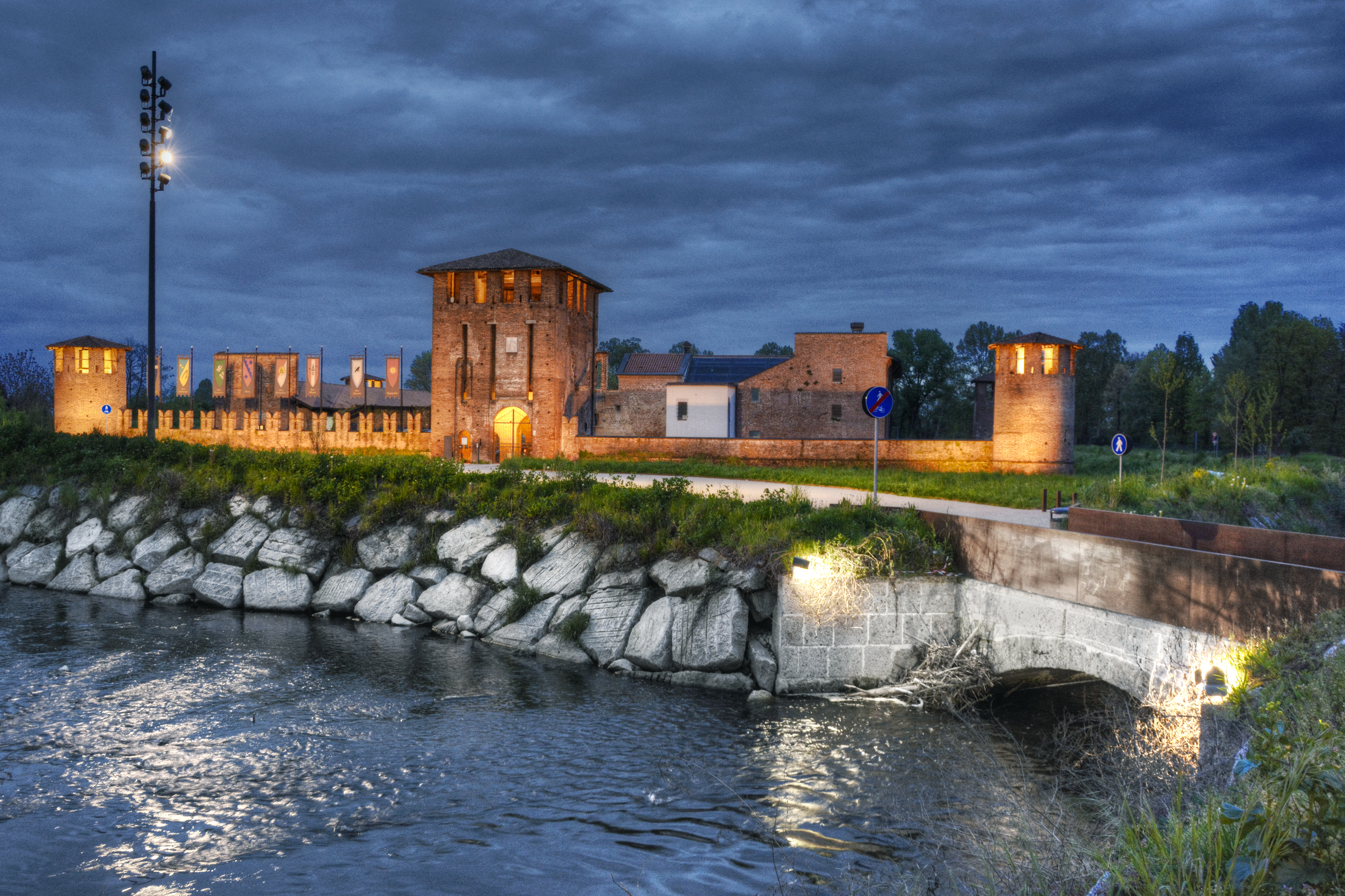 Castello di San Giorgio This is a photo of a monument which is part of cultural heritage of Italy.